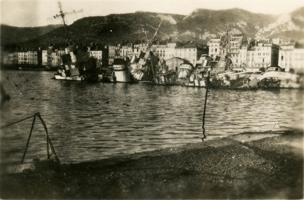 Vue du sabordement de la Flotte à Toulon le 28 novembre 1942.